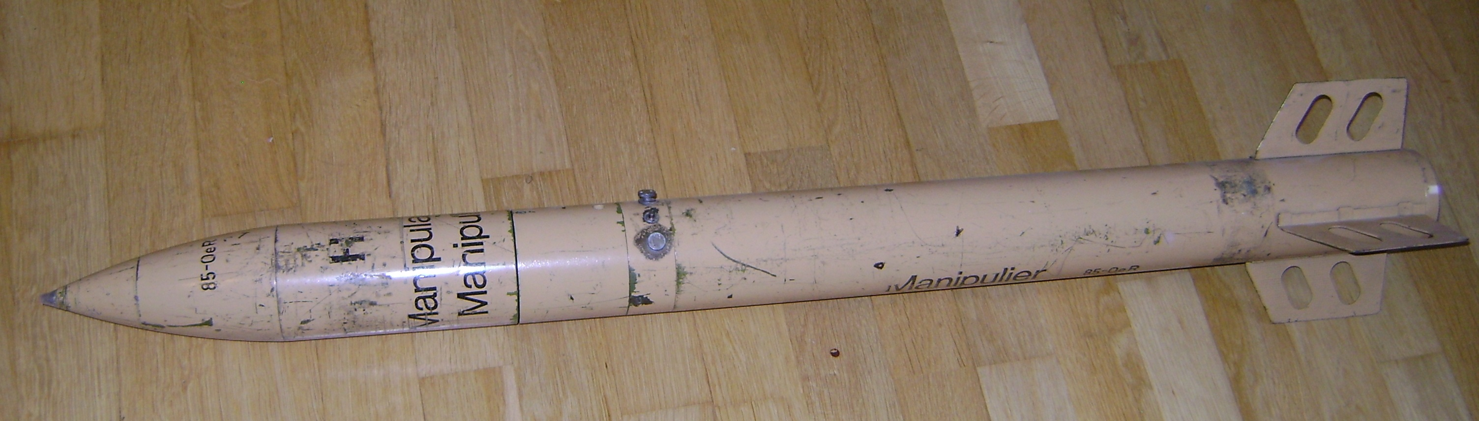 Oerlikon86